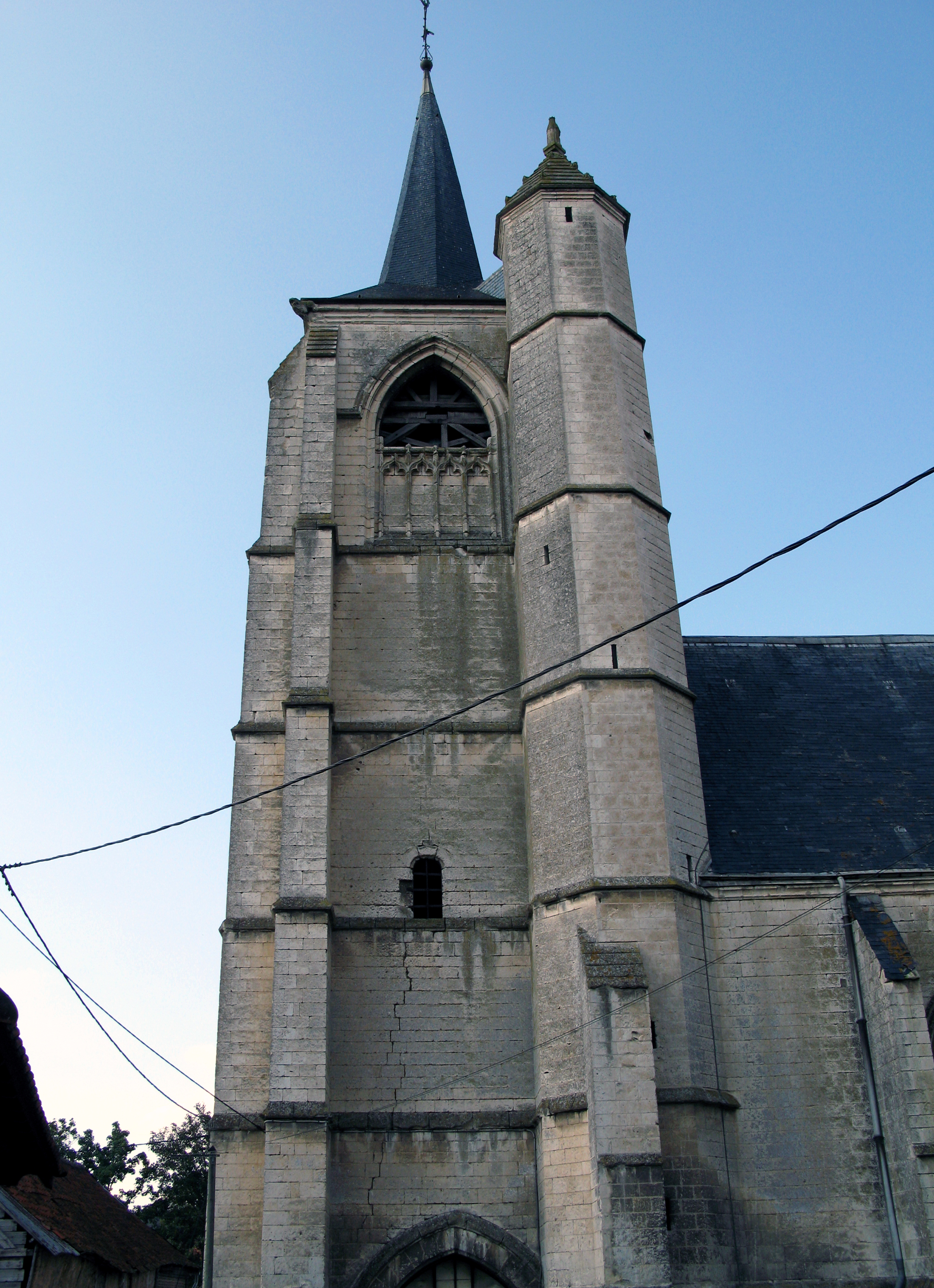 Allery (Somme, France) - Le clocher de l'église.